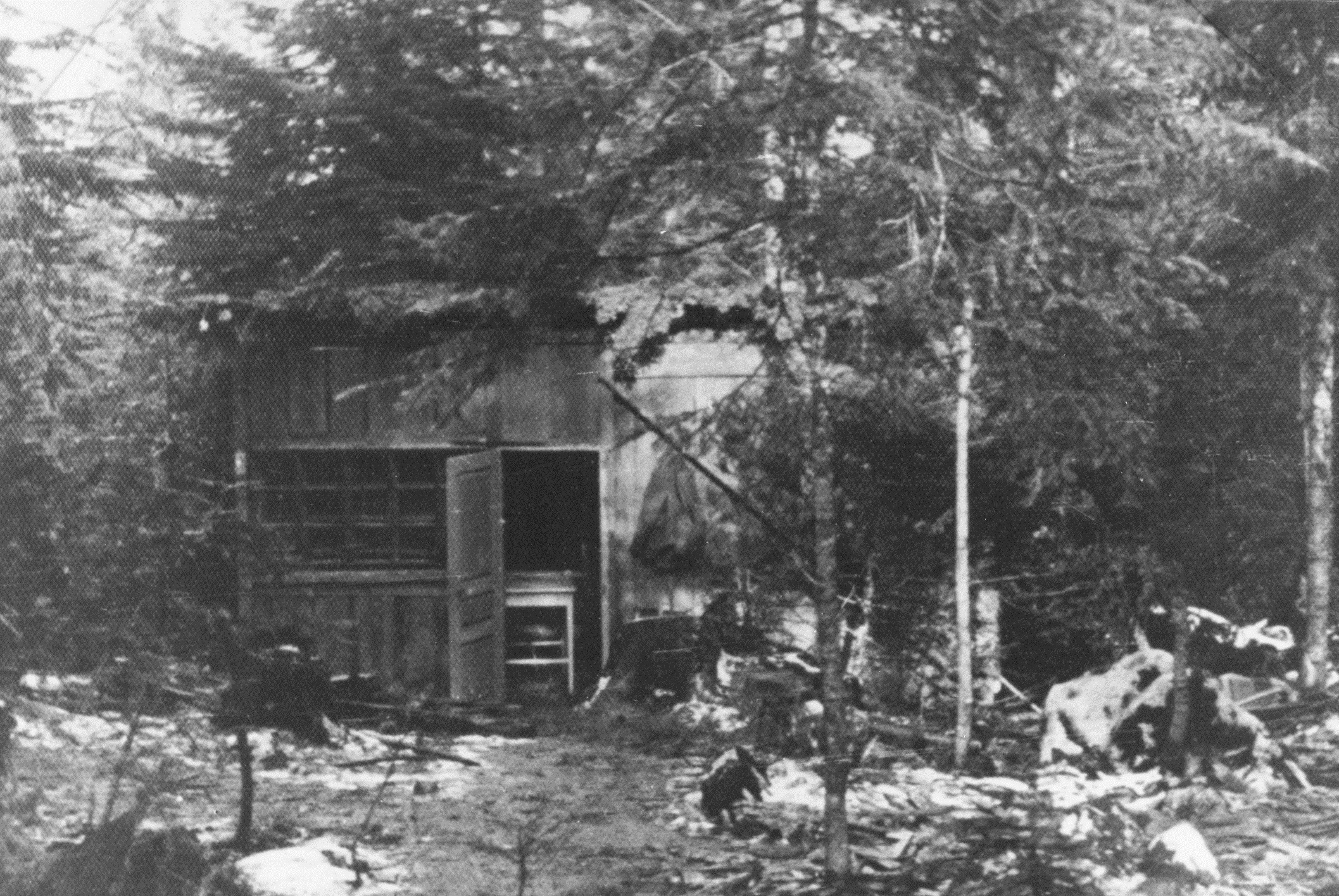 Partizanska bolnišnica Jelenbreg